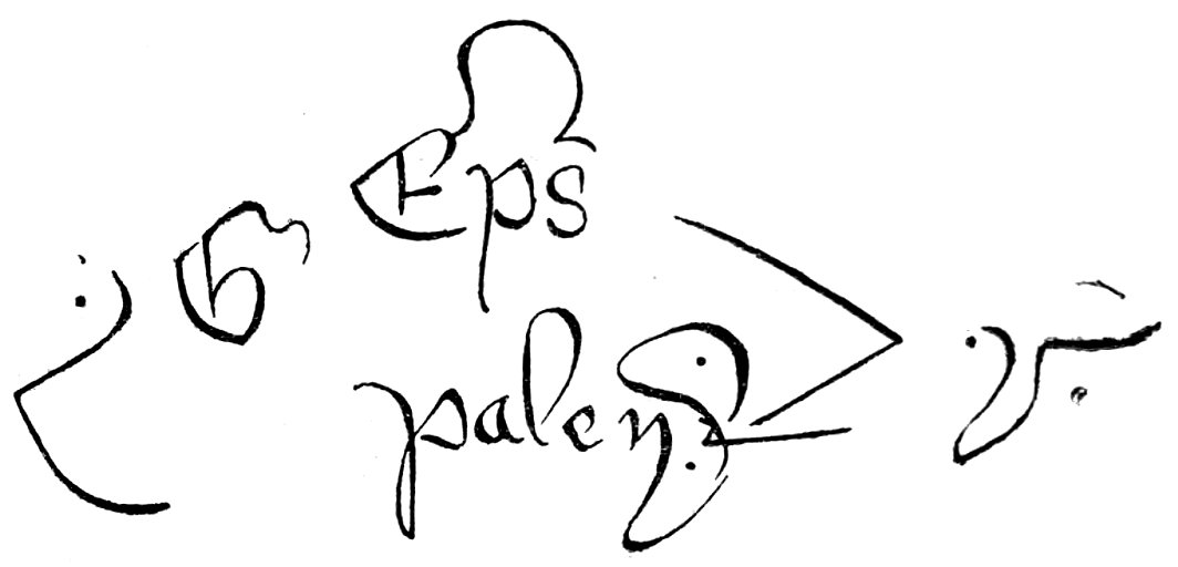 Firma de D. Gutierre Álvarez de Toledo (1376-1446), obispo de Palencia, arzobispo de Sevilla y de Toledo.